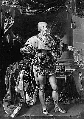 Vittorio Emanuele I di Savoia